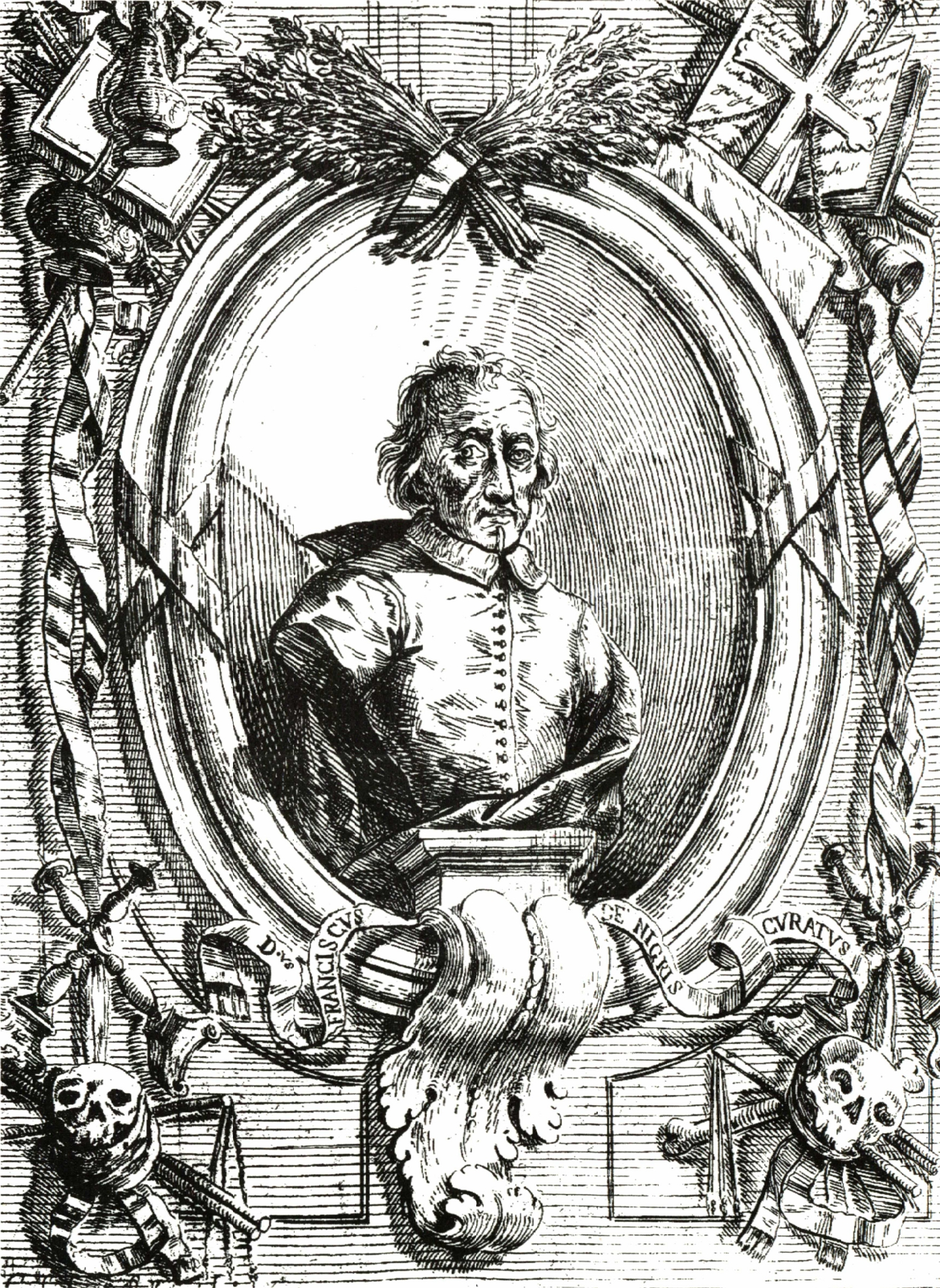 Incisione raffigurante Francesco Negri tratta da Viaggio Settentrionale del 1700.